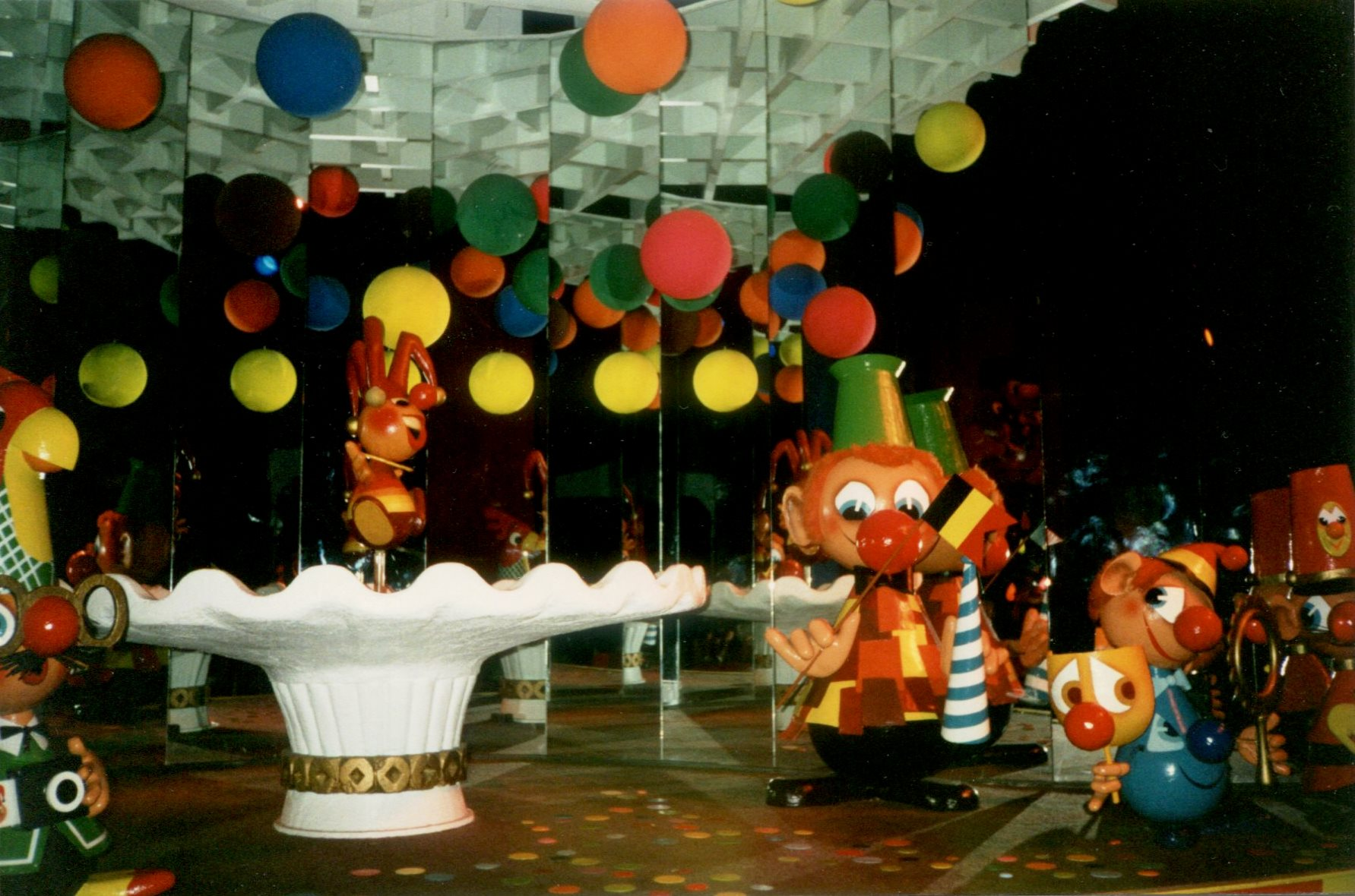 EftelingCarnavalBelgie